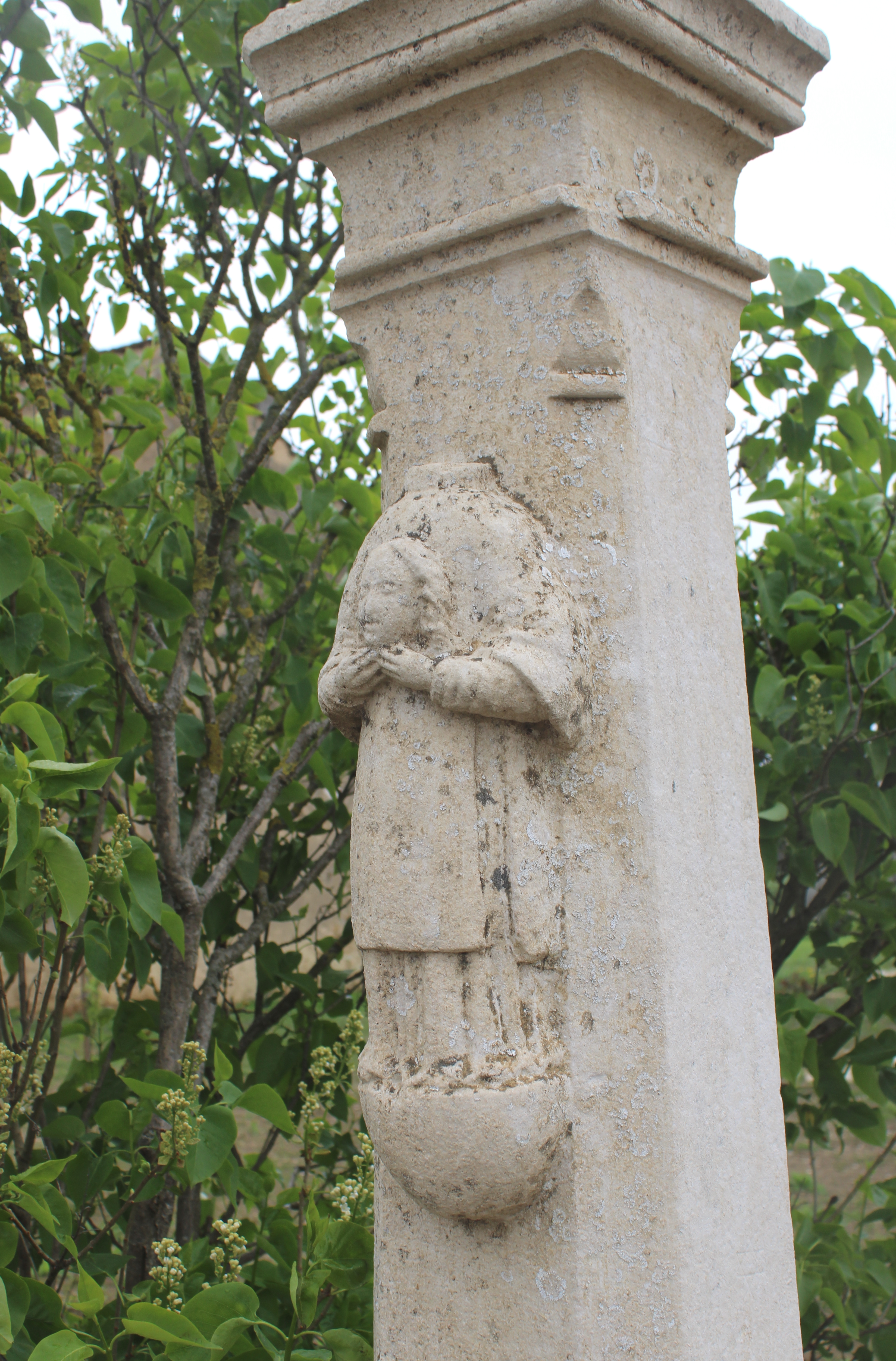 Statue de Saint-Elophe sur la calvaire à Punerot